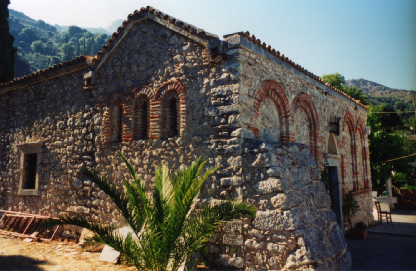 Kloster Kera Kardiotissa, Crete, Monastery